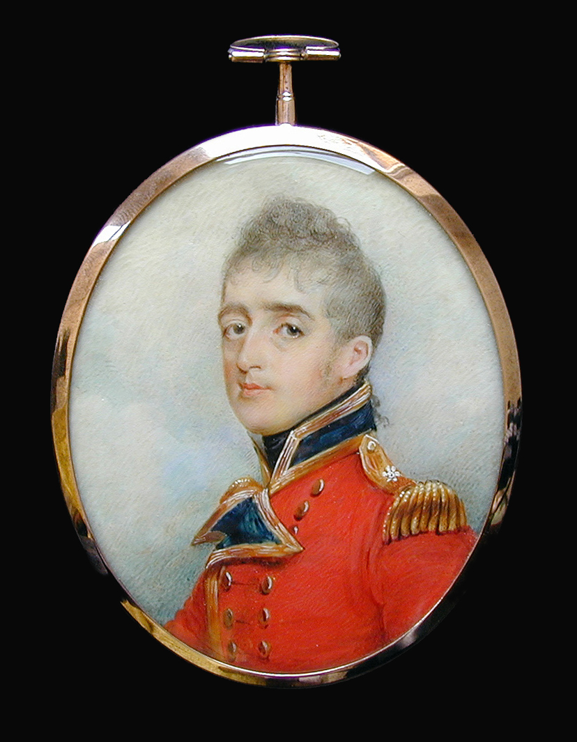 Stephen Peacocke Sr.